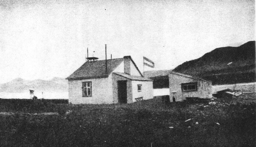 Estación meteorológica de Argentina en Grytviken, islas Georgias del Sur. Funcionó entre 1905 y 1950.